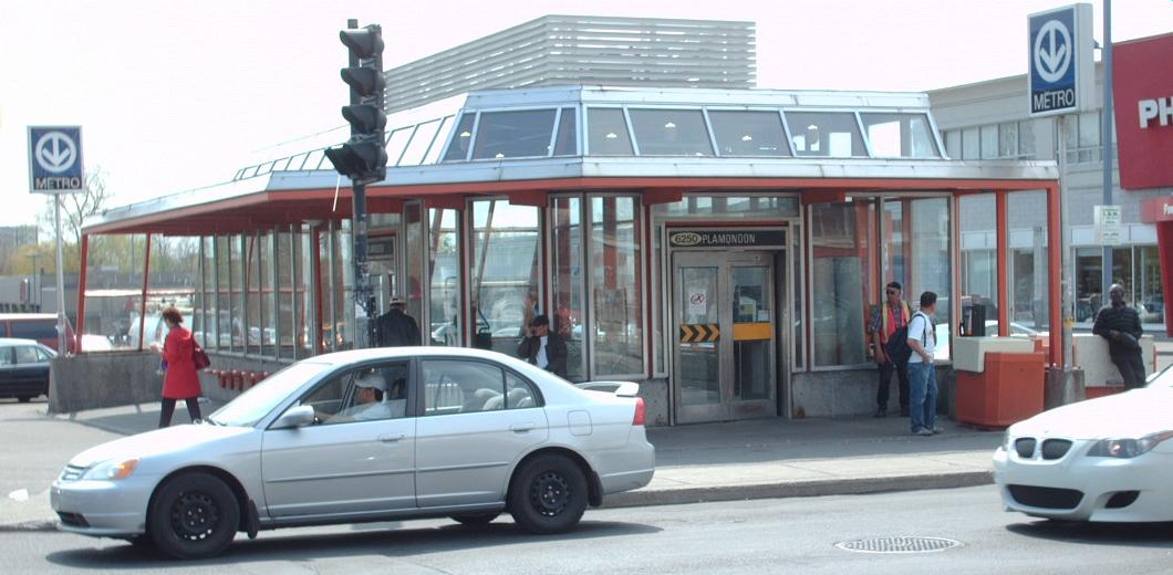 Plamondon Montreal metro station.